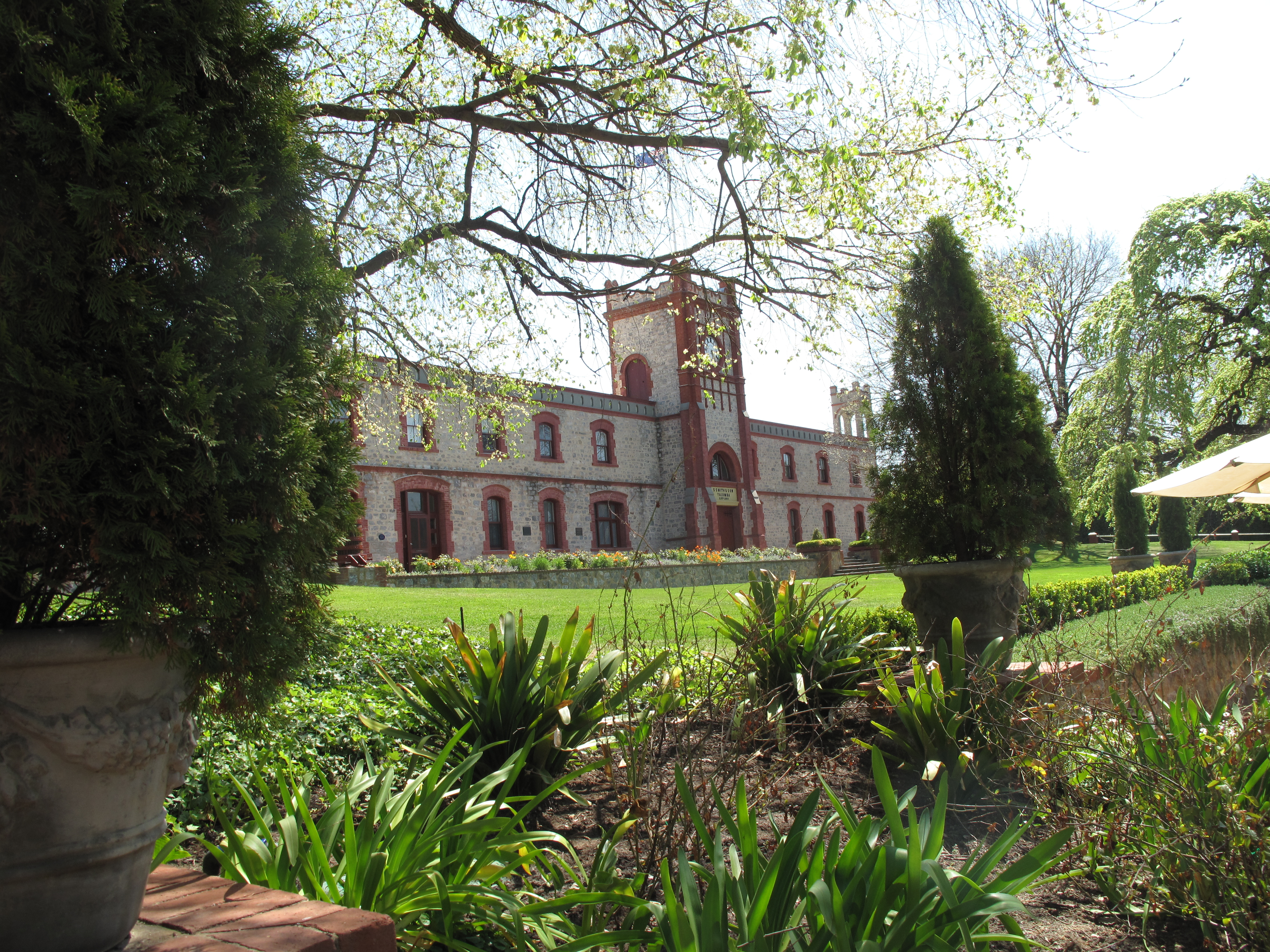 Yalumba Winery, Angaston